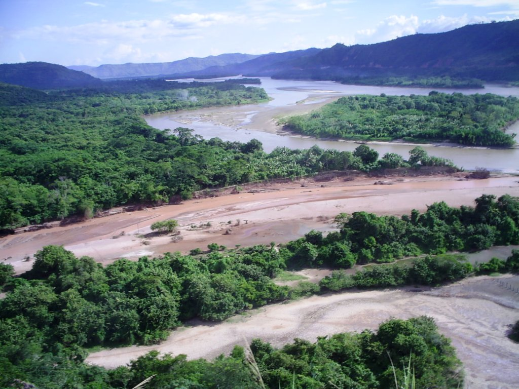 Quebrada Misquiyacu desembocando en el Huallaga, zona periferica del Distrito de Pilluana